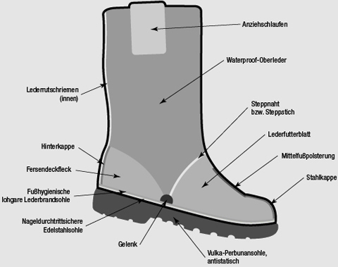 Ein Feuerwehrstiefel Querschnitt. Eine schematische Darstellung des Aufbaus eines Feuerwehrstiefels.